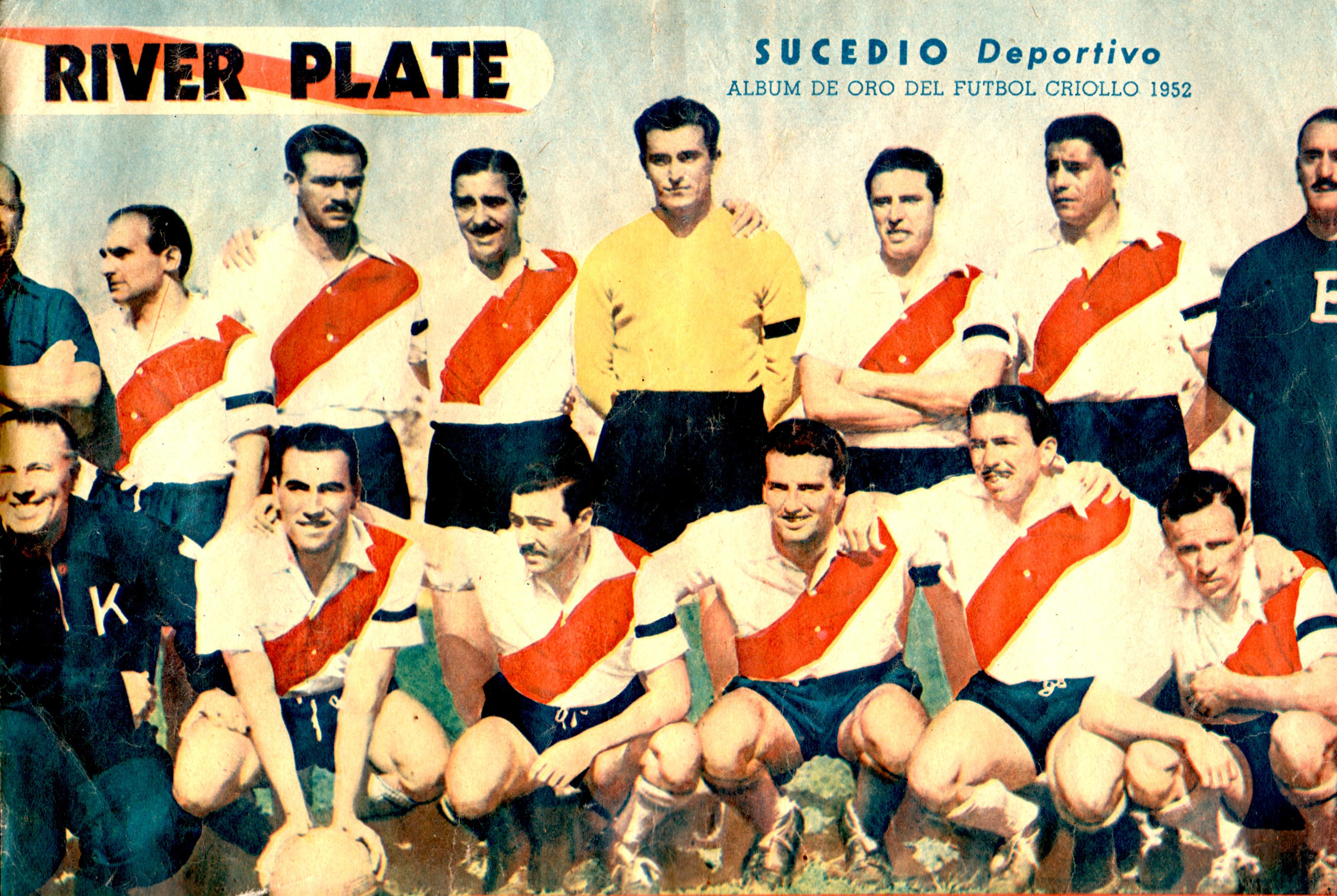 Fotografía de el equipo de River Plate campeón de 1952. Arriba: Yácono, Spada, Ramos, Amadeo Carrizo, Ferrari y Soria. Abajo: Vernazza, Walter Gómez, Prado, Labruna y Loustau.